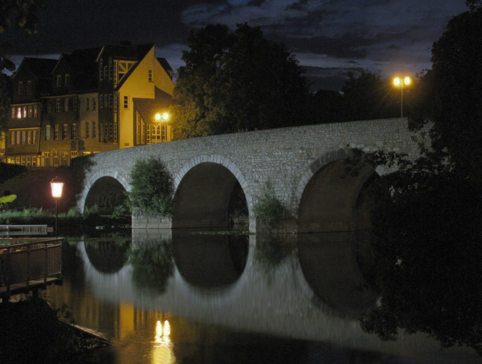 Alte Lahnbrücke in Wetzlar (Privatarchiv)